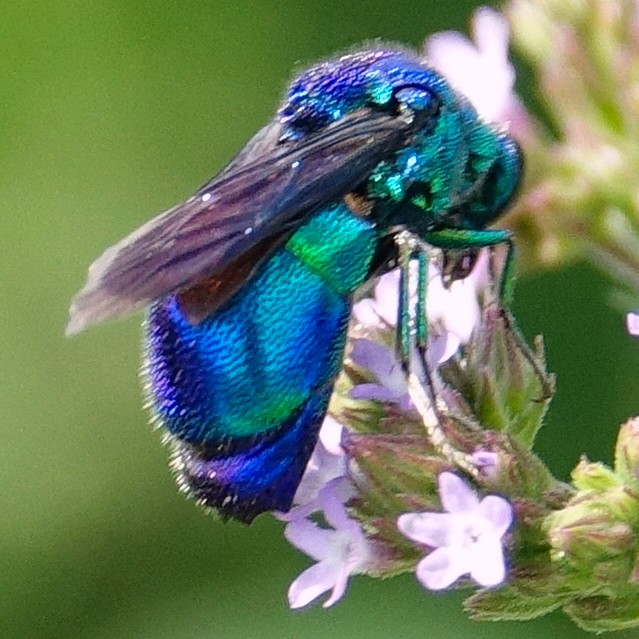 花の上に乗るオオセイボウ 日本東海地方